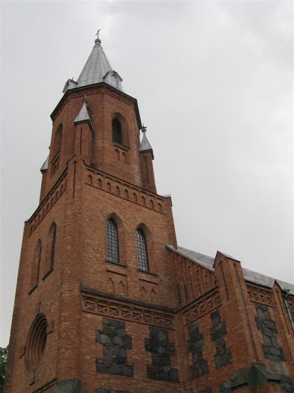 Panemunio Švč. Trejybės bažnyčia